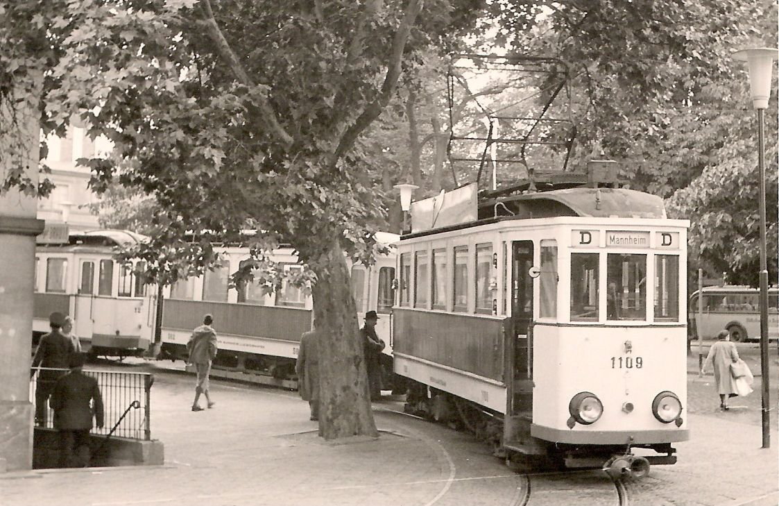 Triebwagen 1109 der Rhein-Haardt-Bahn in Bad Dürkheim